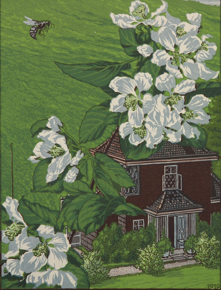 Mein Haus - Holzschnitt